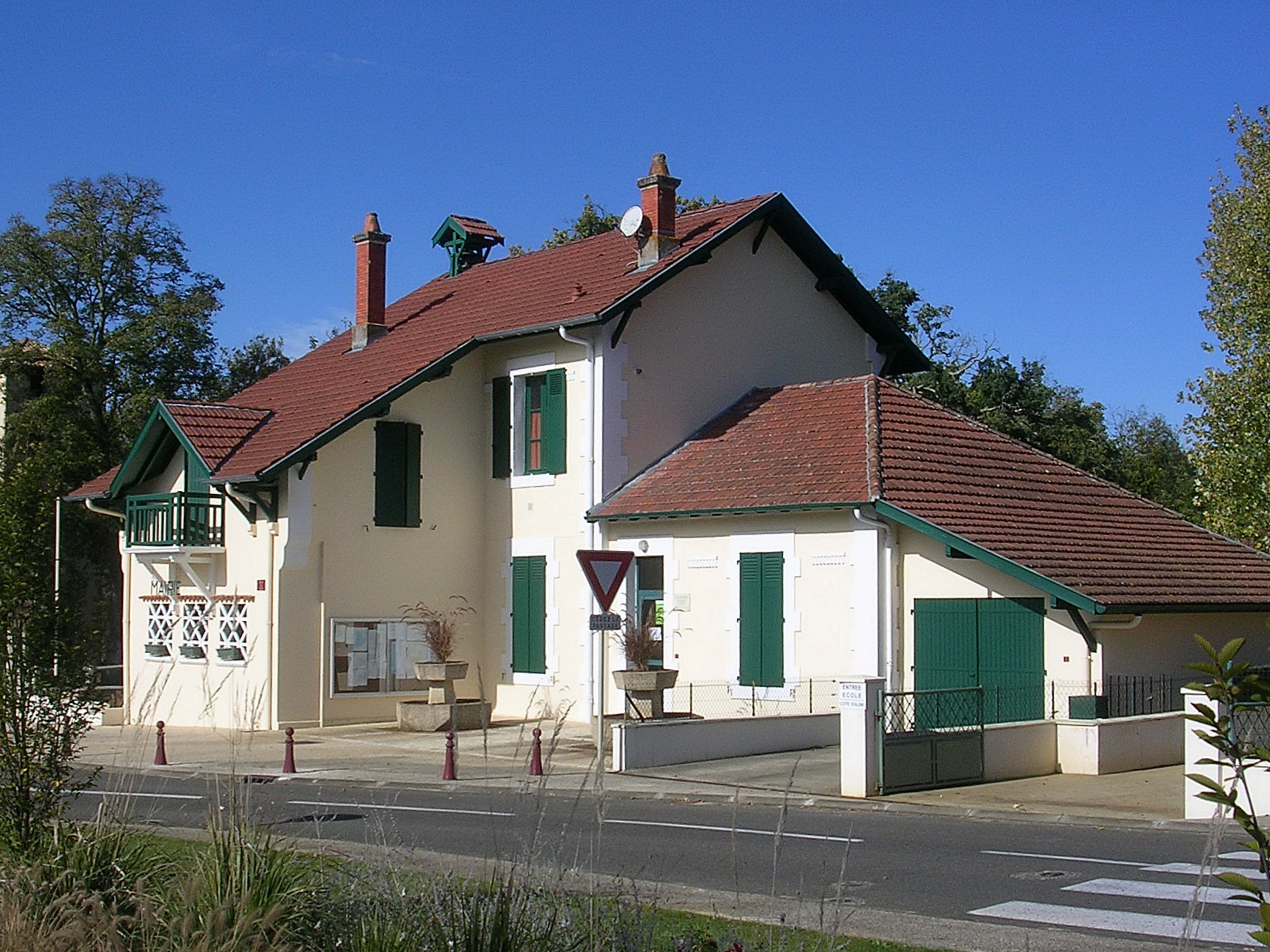 Mairie de Saint-Avit (Landes, France)